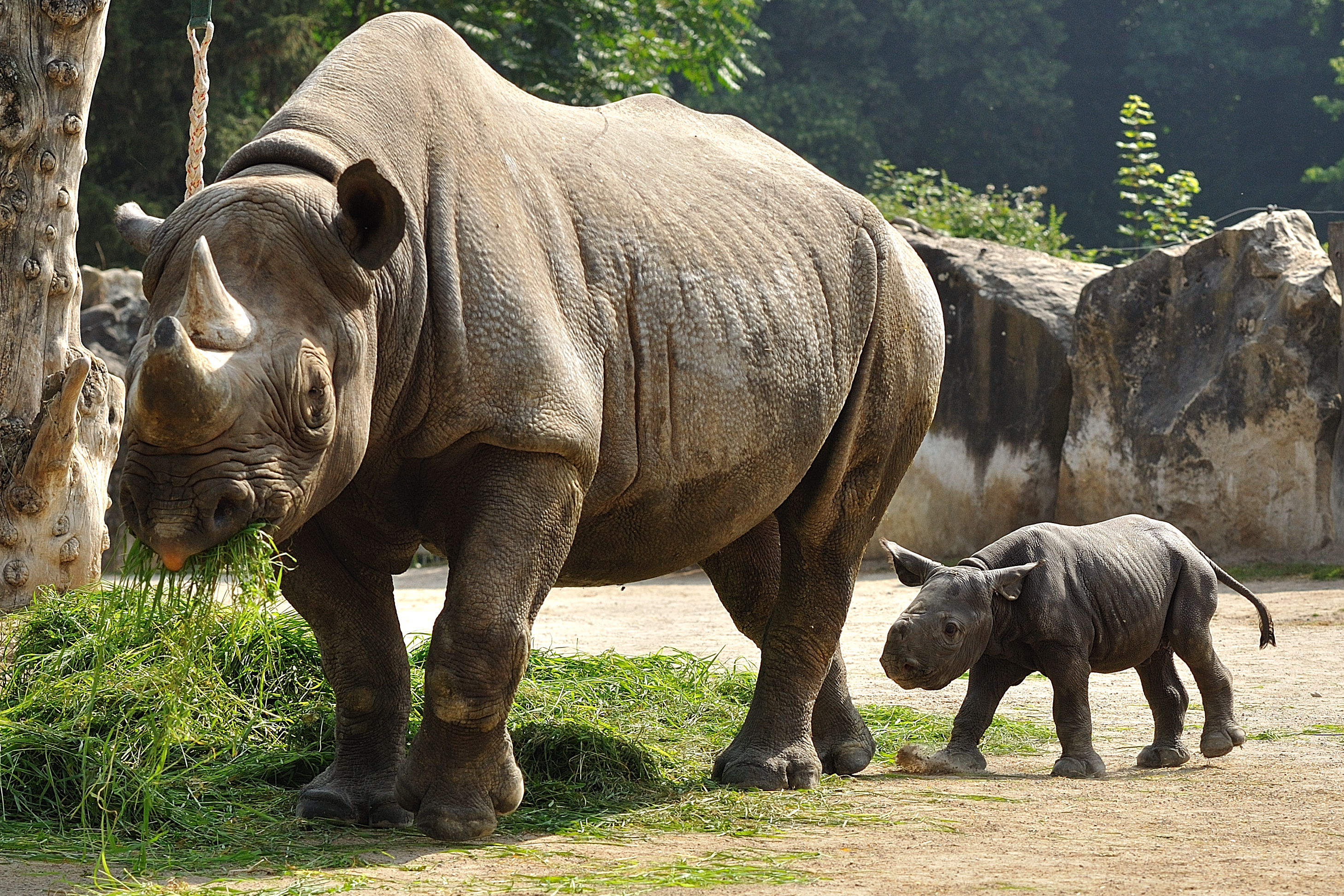 Nashornmutter Nane und ihr jüngster Nachwuchs Nabila